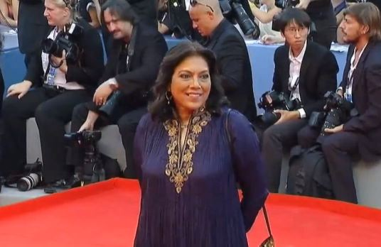 Мира Наир на 69-м Венецианском кинофестивале.